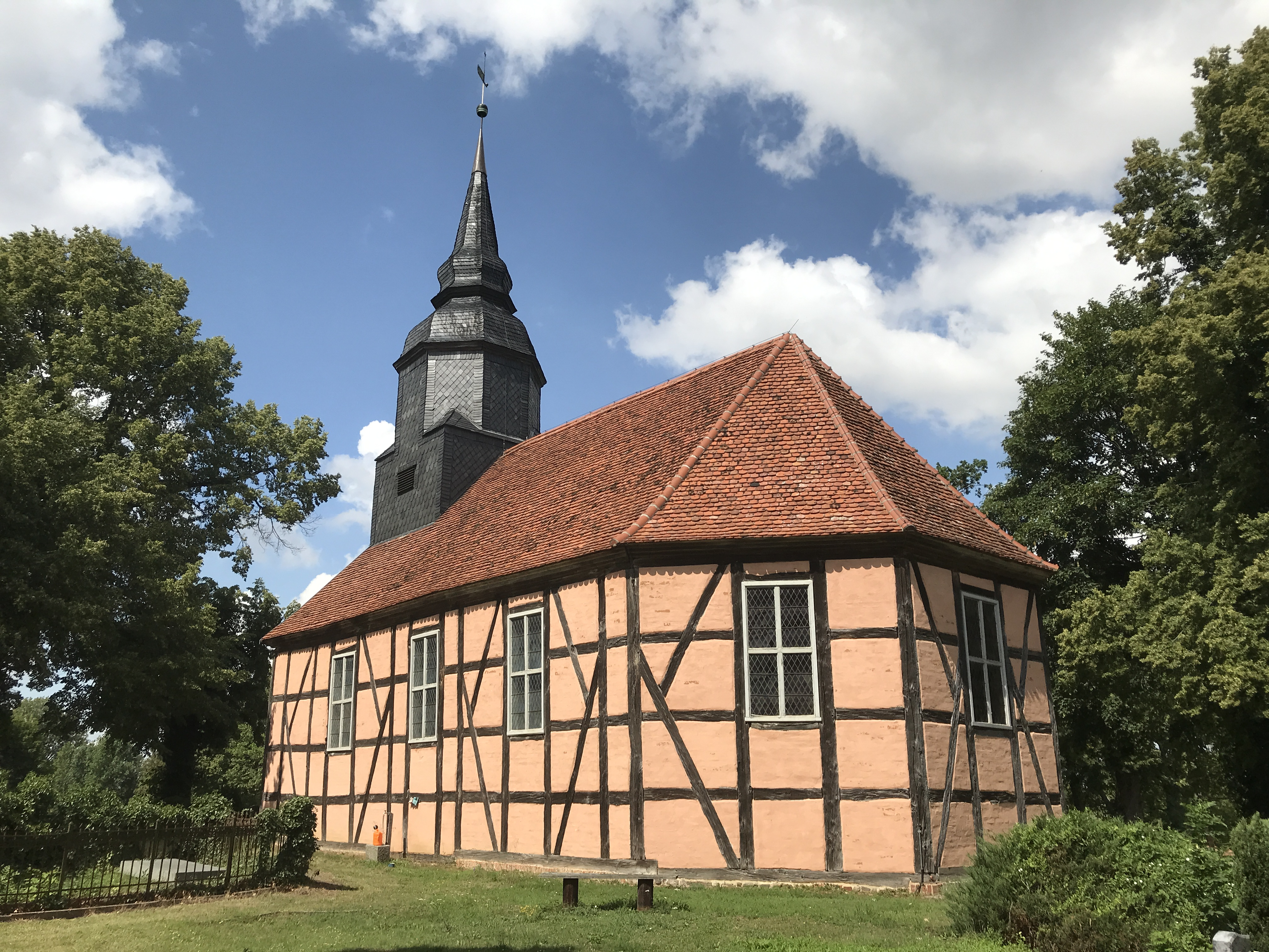 Die Dorfkirche Schönhausen ist eine Fachwerkkirche in Schönhausen im Landkreis Mecklenburgische Seenplatte in Mecklenburg-Vorpommern. Im Innern stehen unter anderem ein Kanzelaltar sowie eine Patronatsloge aus der Bauzeit.